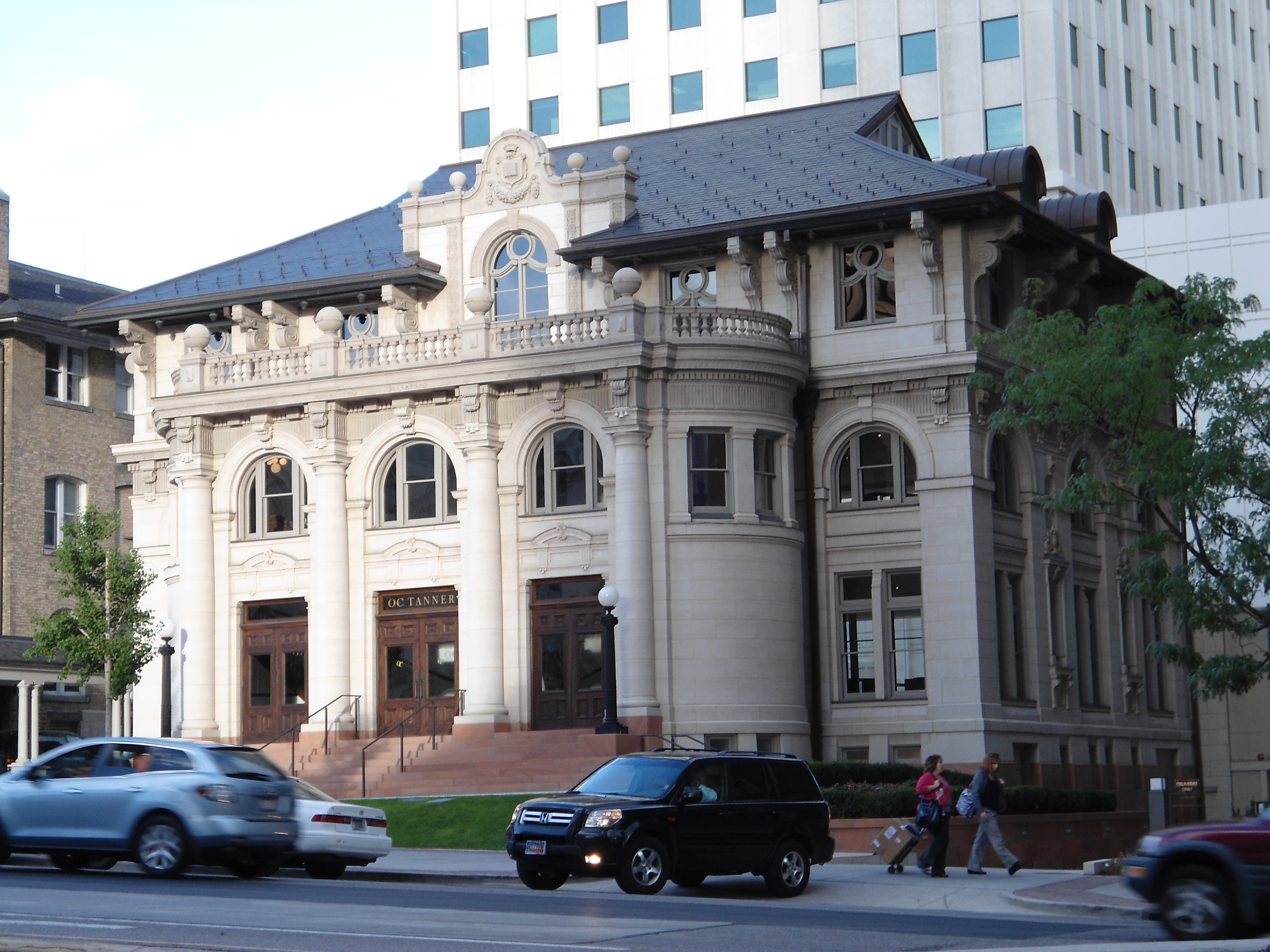 OC Tanner